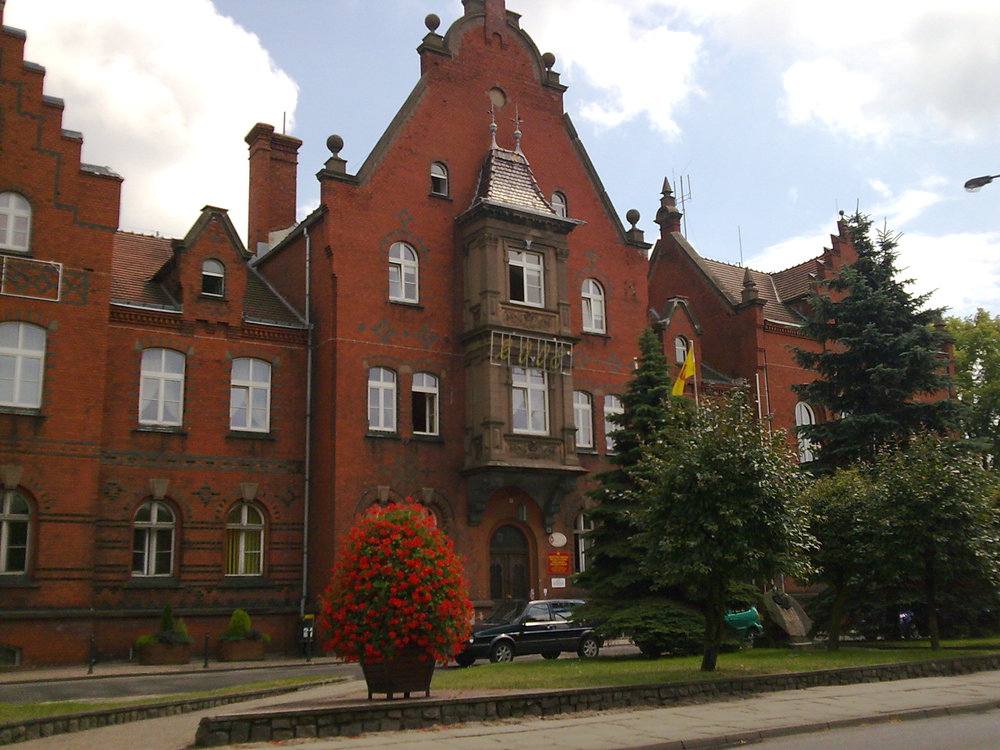 siedziba prezydenta miasta w Starogardzie Gdańskim